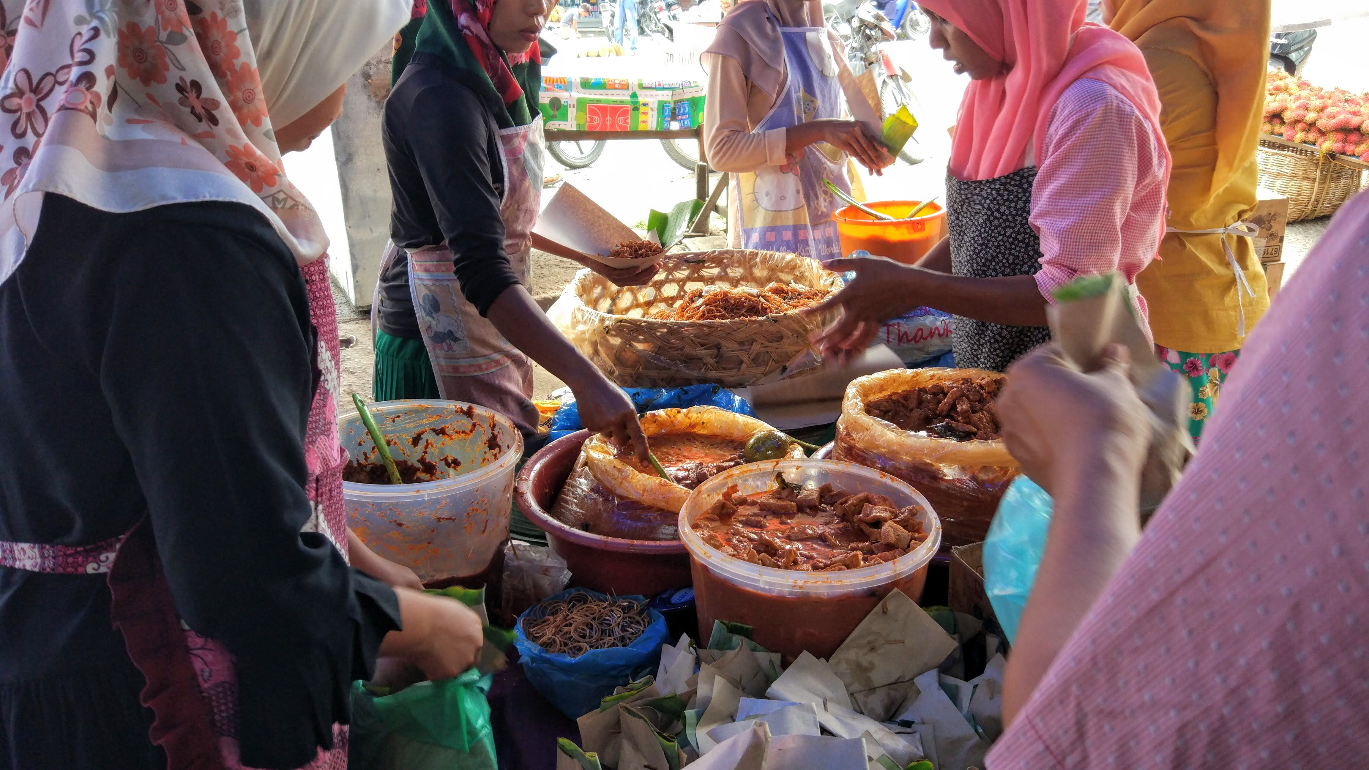 Mie paling ekonomis dengan kualitas terbaik di Aceh